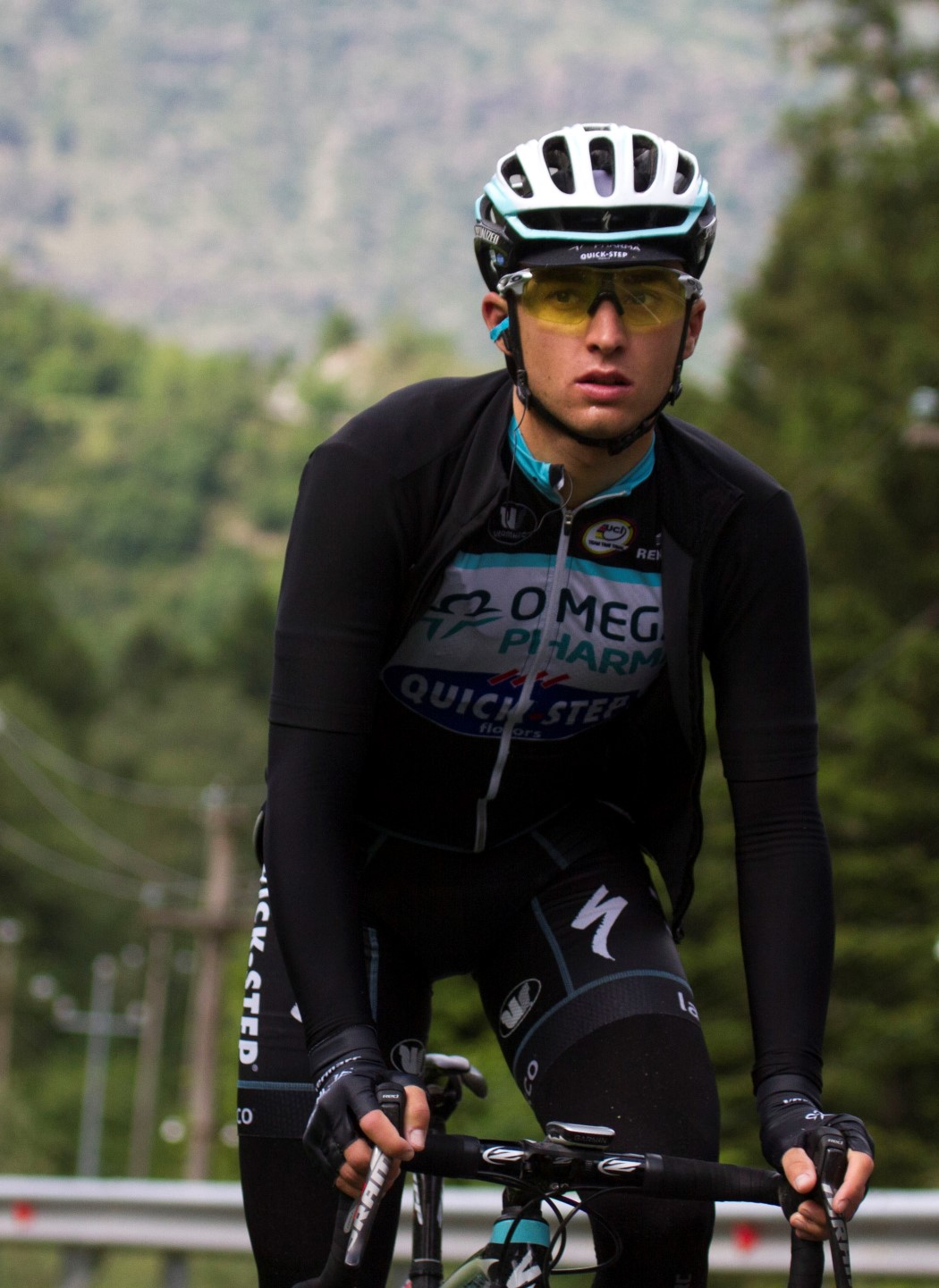 073 brambilla